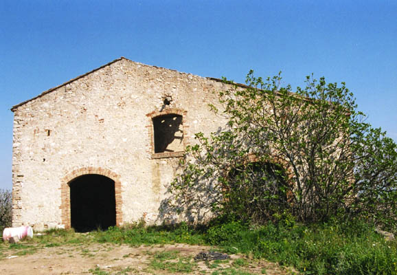 L'era del mas de Barberà